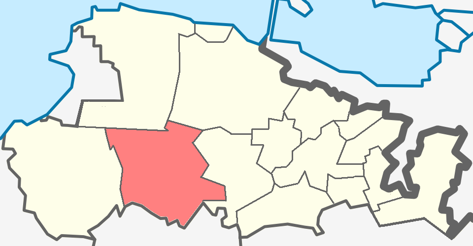 Лопухинское сельское поселение Ломоносовского района Ленинградской области.